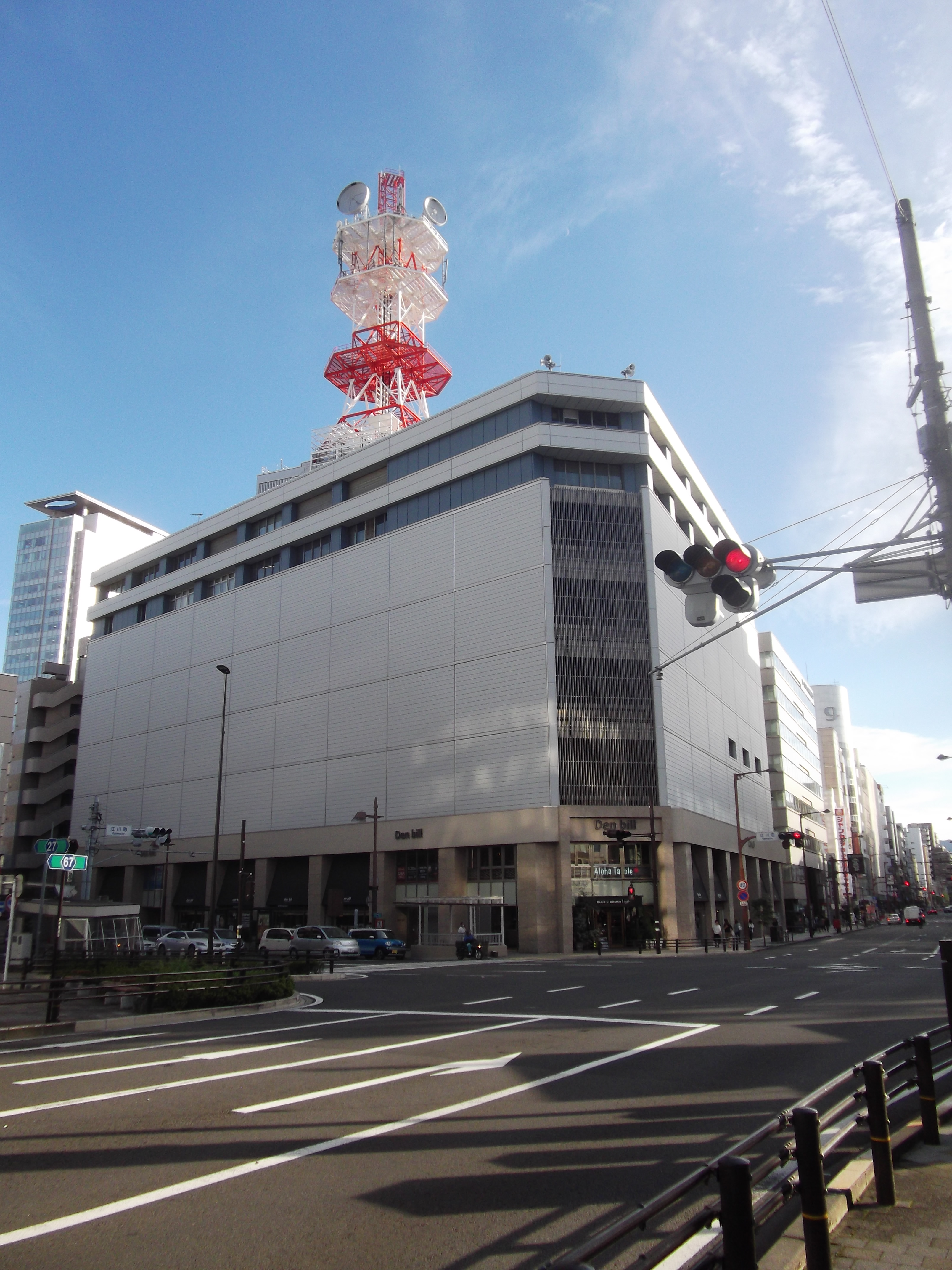 北から撮影したNTT電電ビル。